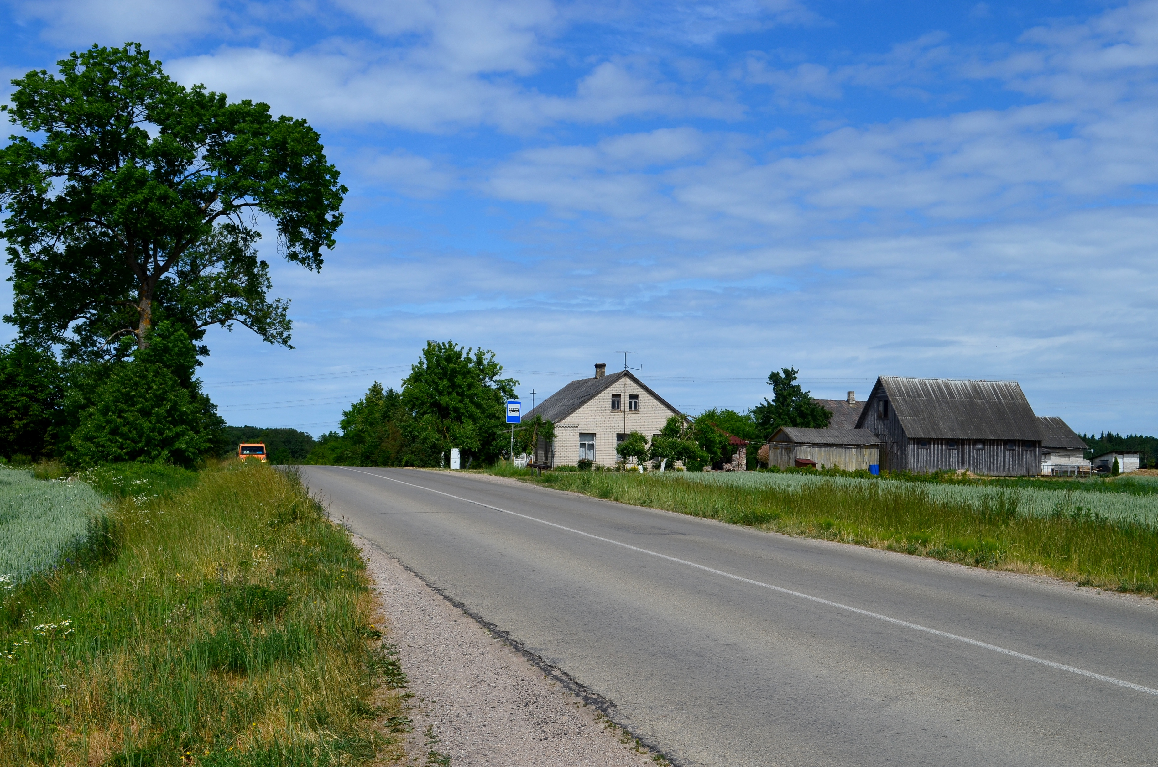 Butrimiškiai, Alytaus raj.